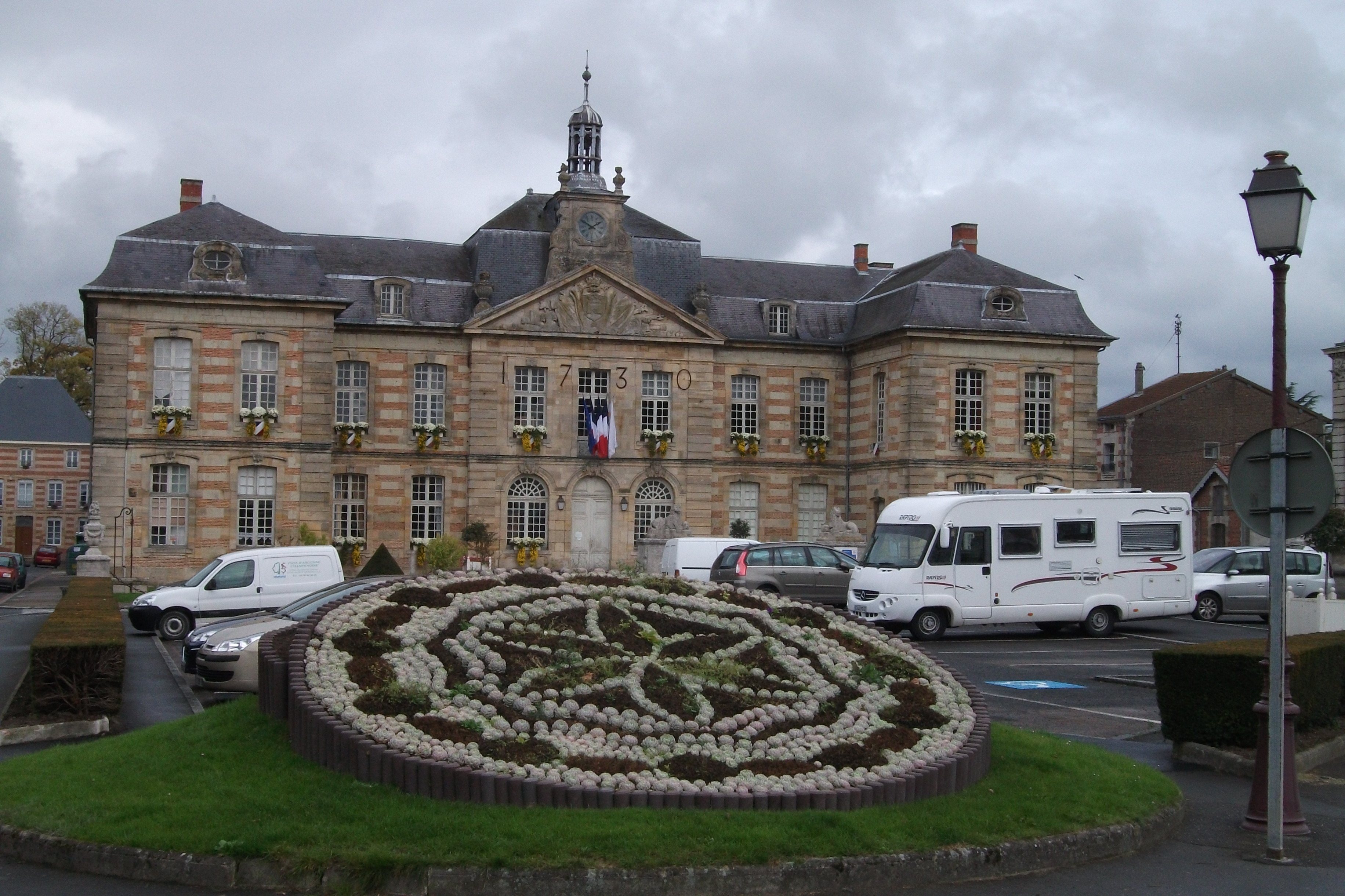 Mairie de Sainte-Ménehould vue depuis la place Leclerc. Reconstruction en brique et gaize en 1730.